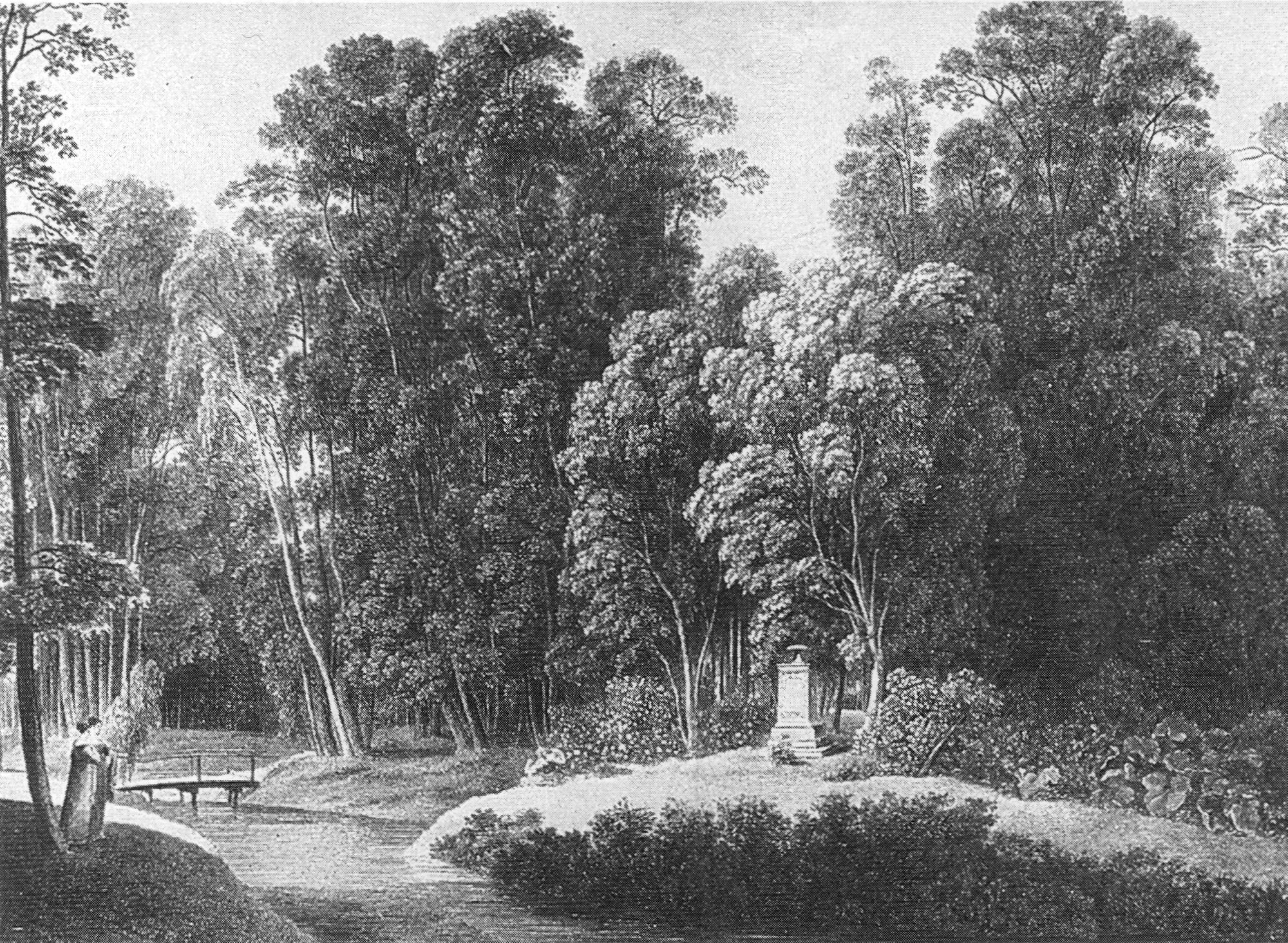 Luiseninsel in Tiergarten park in Berlin, copper engraving